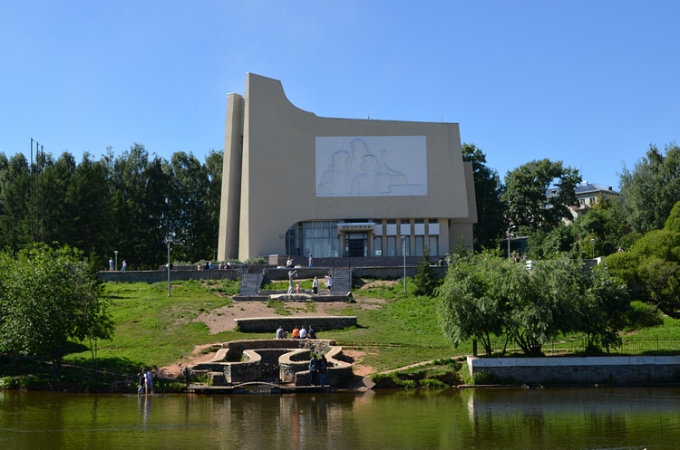 Здание Диорамы, г. Киров